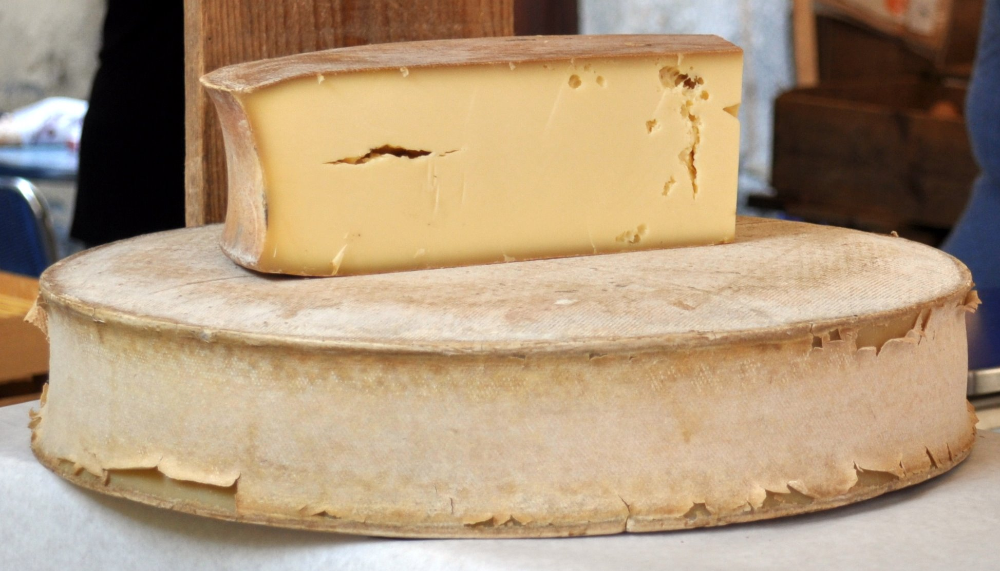 Meules d'abondance